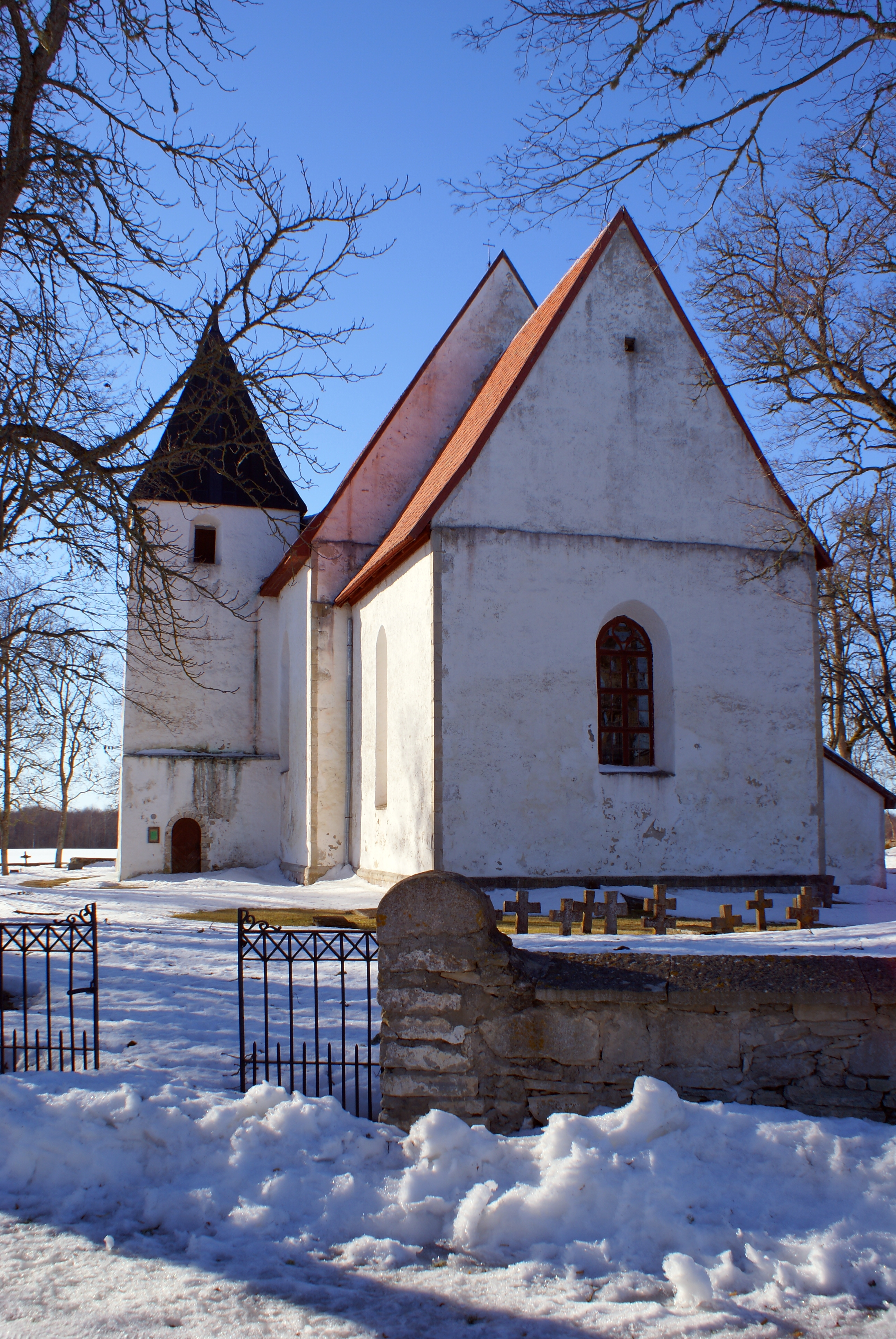 Ridala kirikuaia piirdemüür